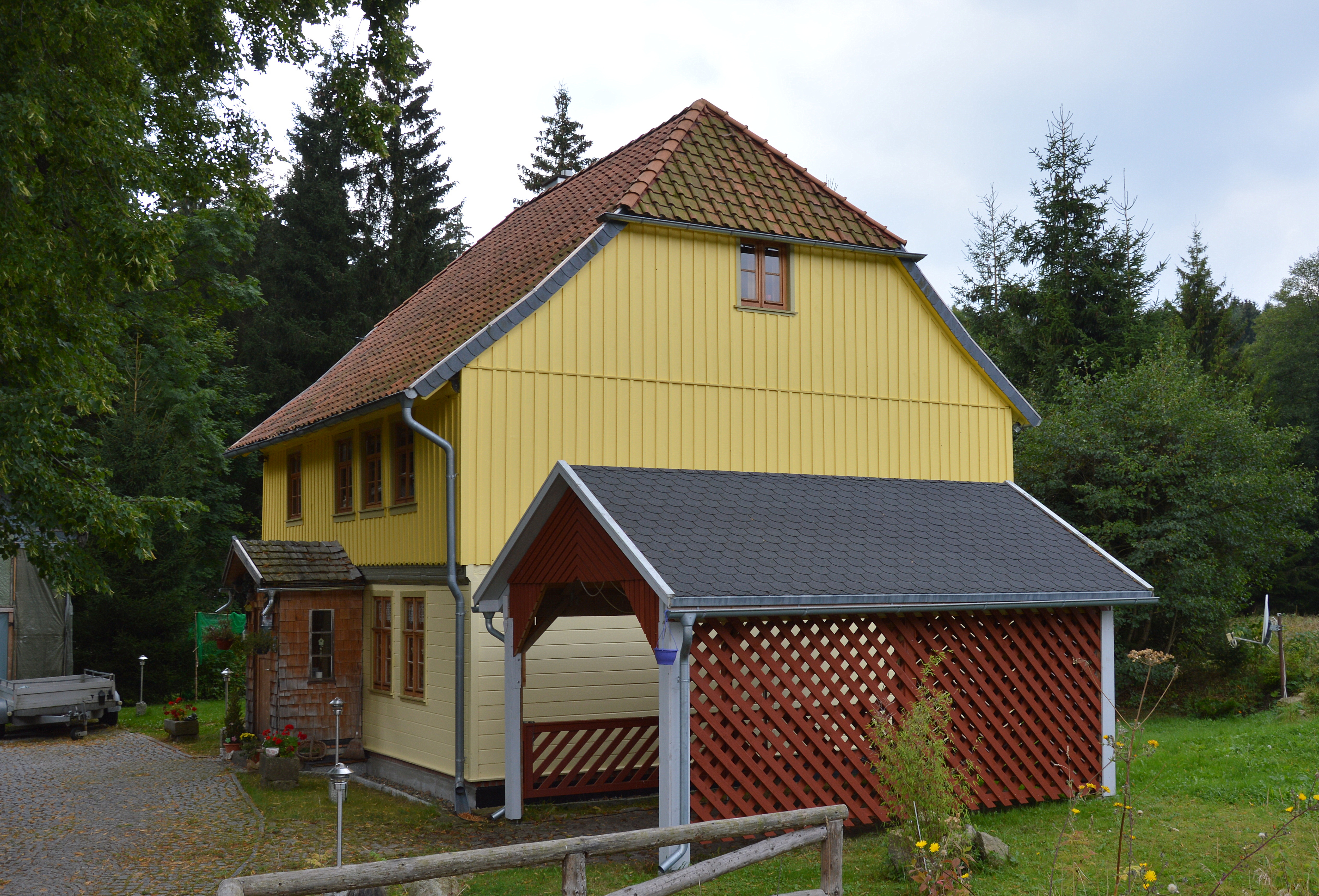 Villa Moock